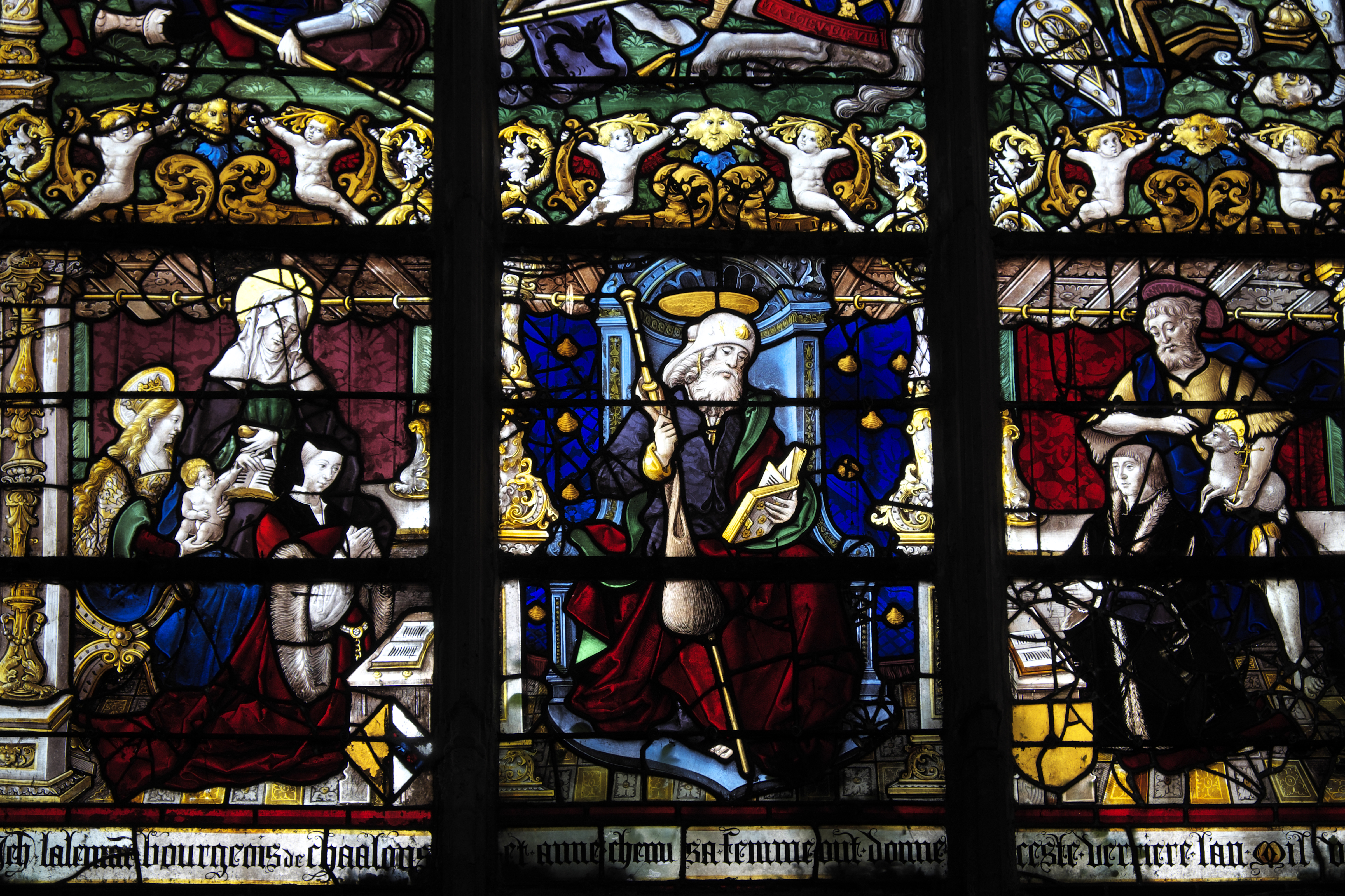 Bleiglasfenster (Baie 27) in der Stiftskirche Notre-Dame-en-Vaux in Châlons-en-Champagne im Département Marne (Champagne-Ardenne/Frankreich), um 1525; mit der Signatur des Renaissance-Glasmalers Mathieu Bléville (oben, Mitte, auf dem roten Band einer Satteldecke); Darstellung: Schlacht von Clavijo; Auschnitt unten: Stifter (rechts und links), hl. Jakobus (Mitte)